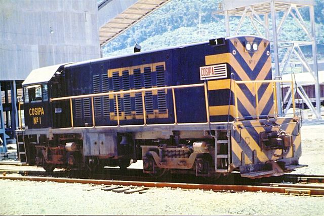 GE U6B nº1 COSIPA adquiridas em 12/1960. Coleção de Juliano Firveda Serra.